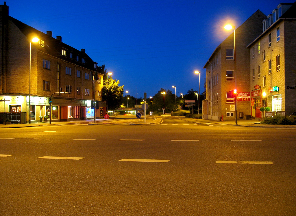 Gentofte: Nybrovej / Brogårdsvej / Vangedevej by evening